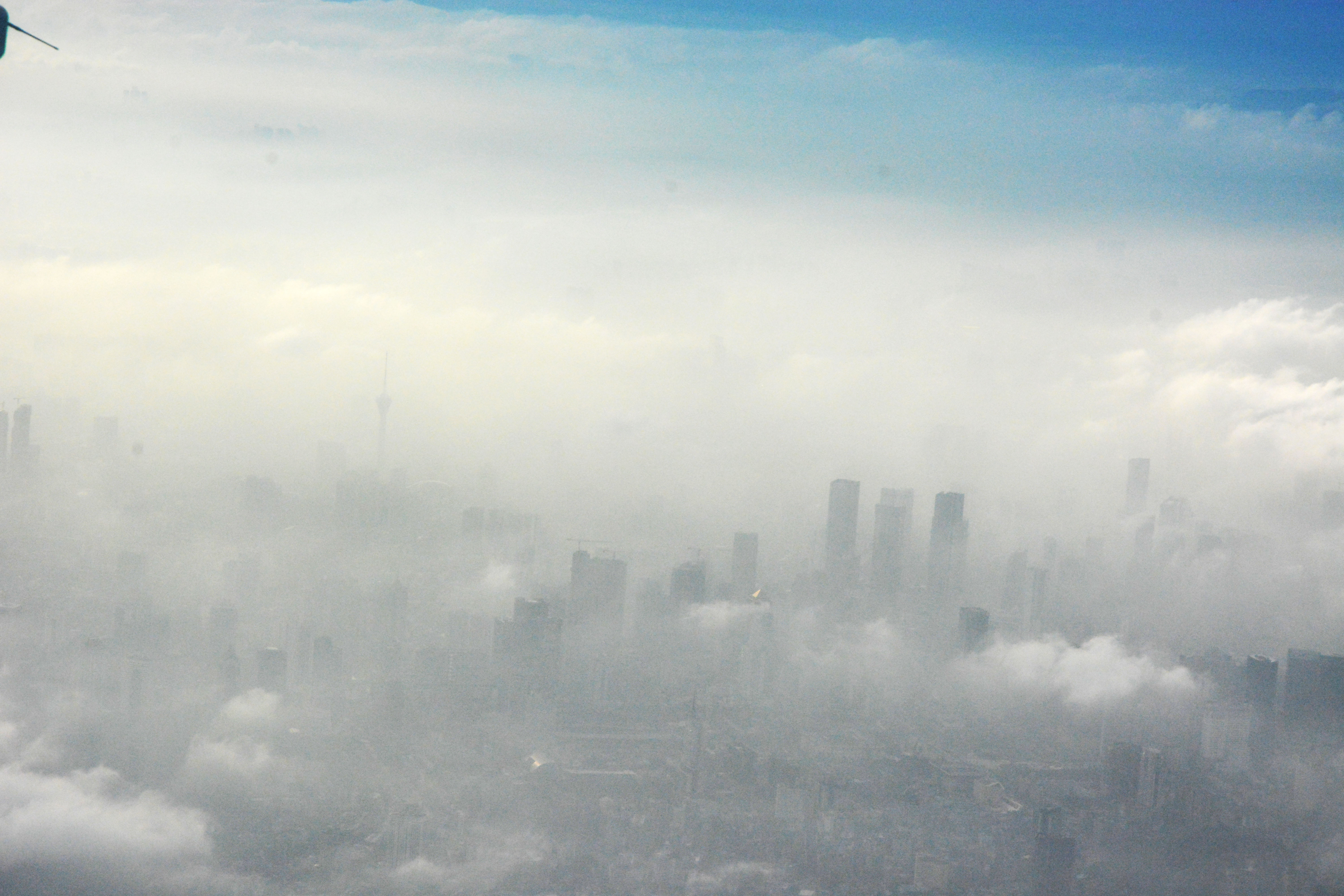 空中俯瞰成都（西南方向，民航客机上）